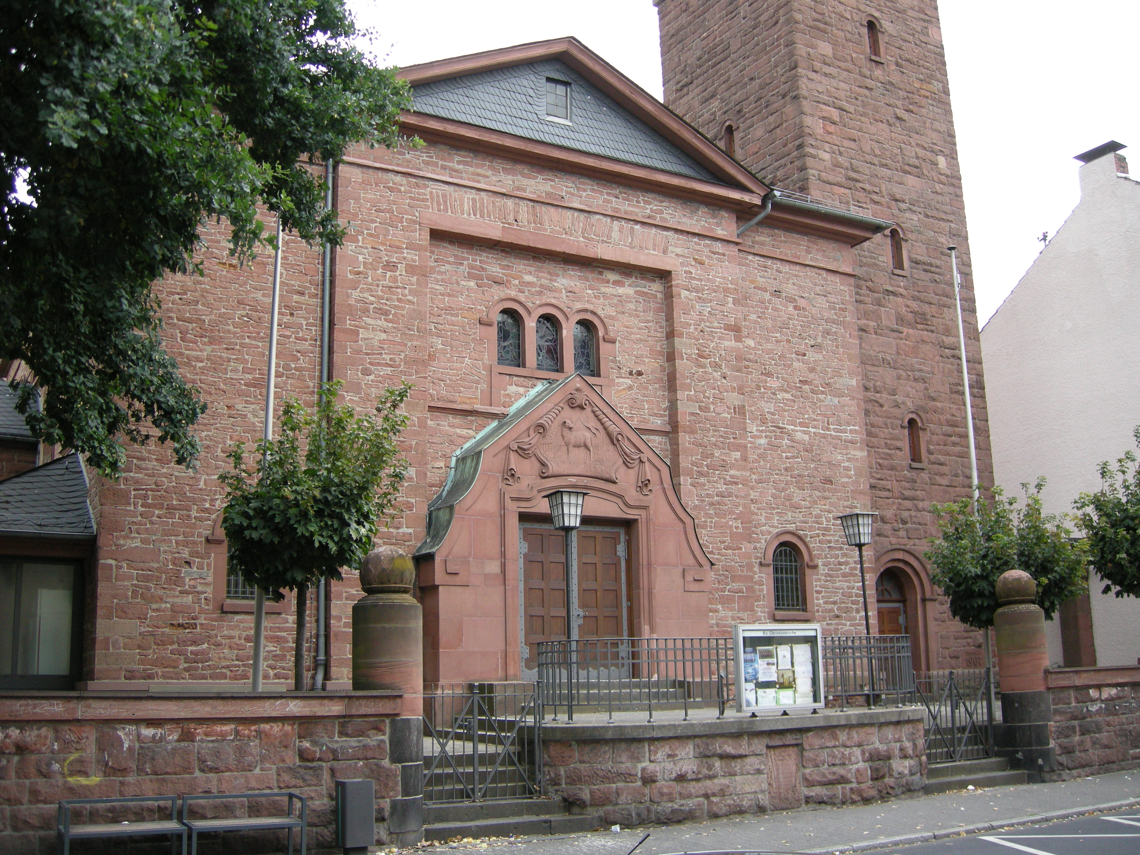 Ev. Christuskirche Nied, erbaut 1828